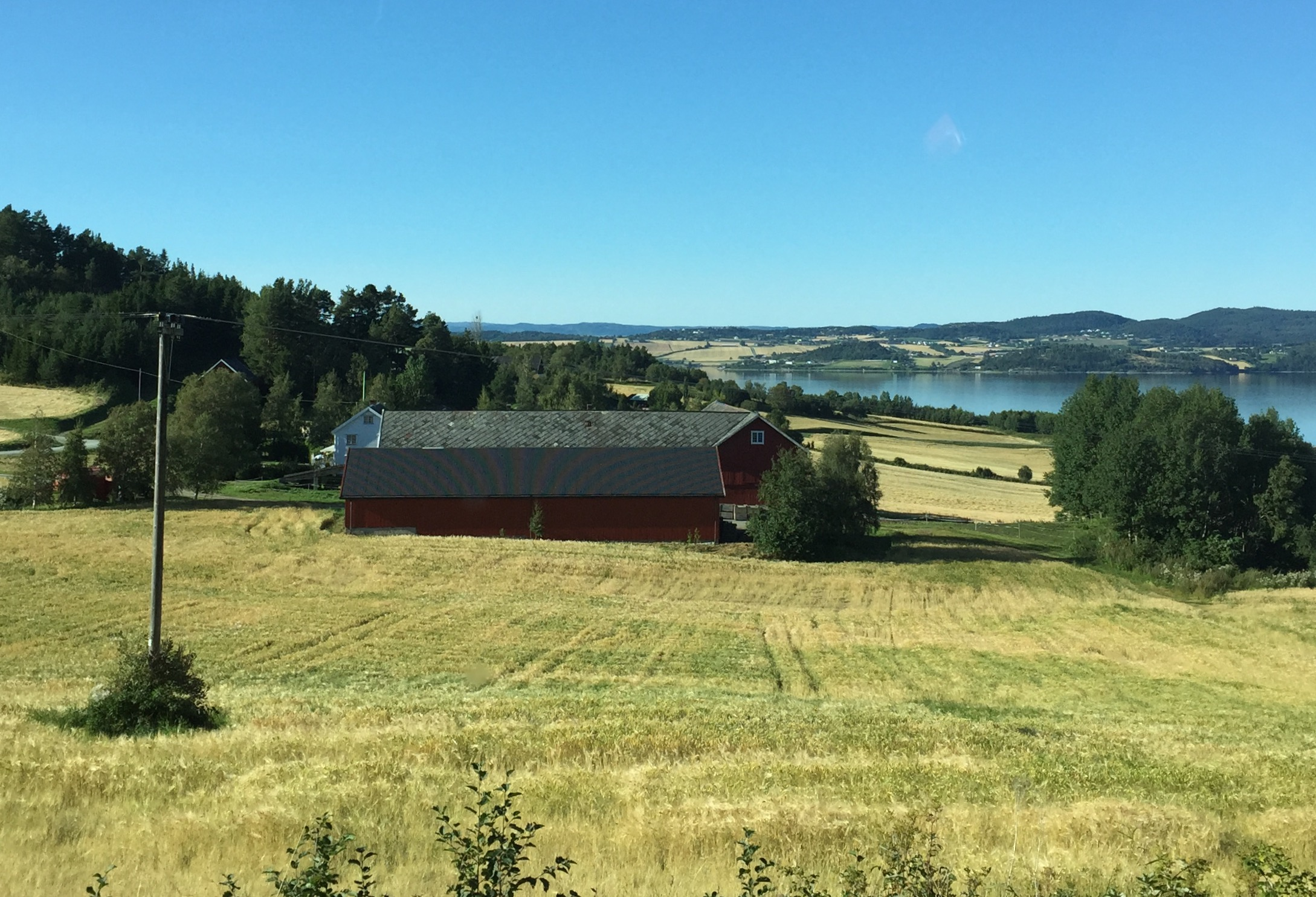 Østre Fløan på Skatval i Nord-Trøndelag, sett fra øst.